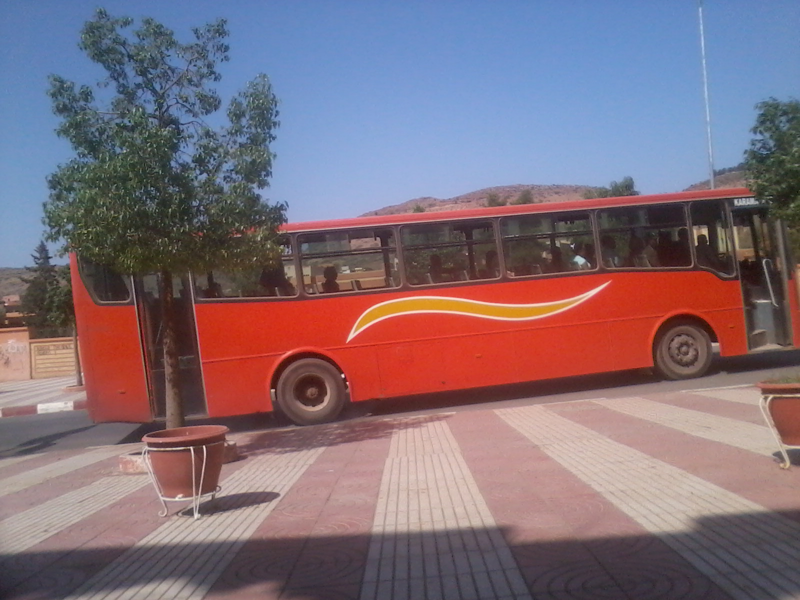 Bus de Khénifra ,photo personnelle prise par Hadraj